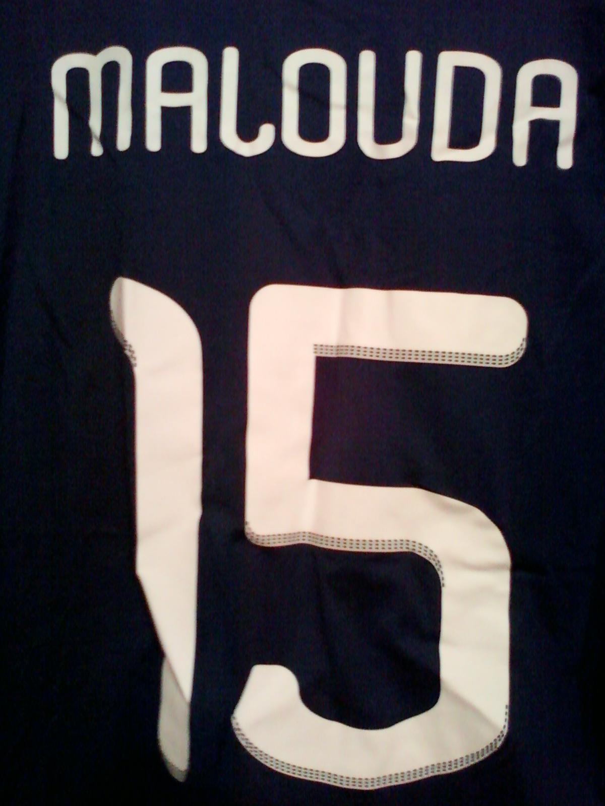 Dos du maillot domicile 2009-2010 de Florent Malouda en équipe de France